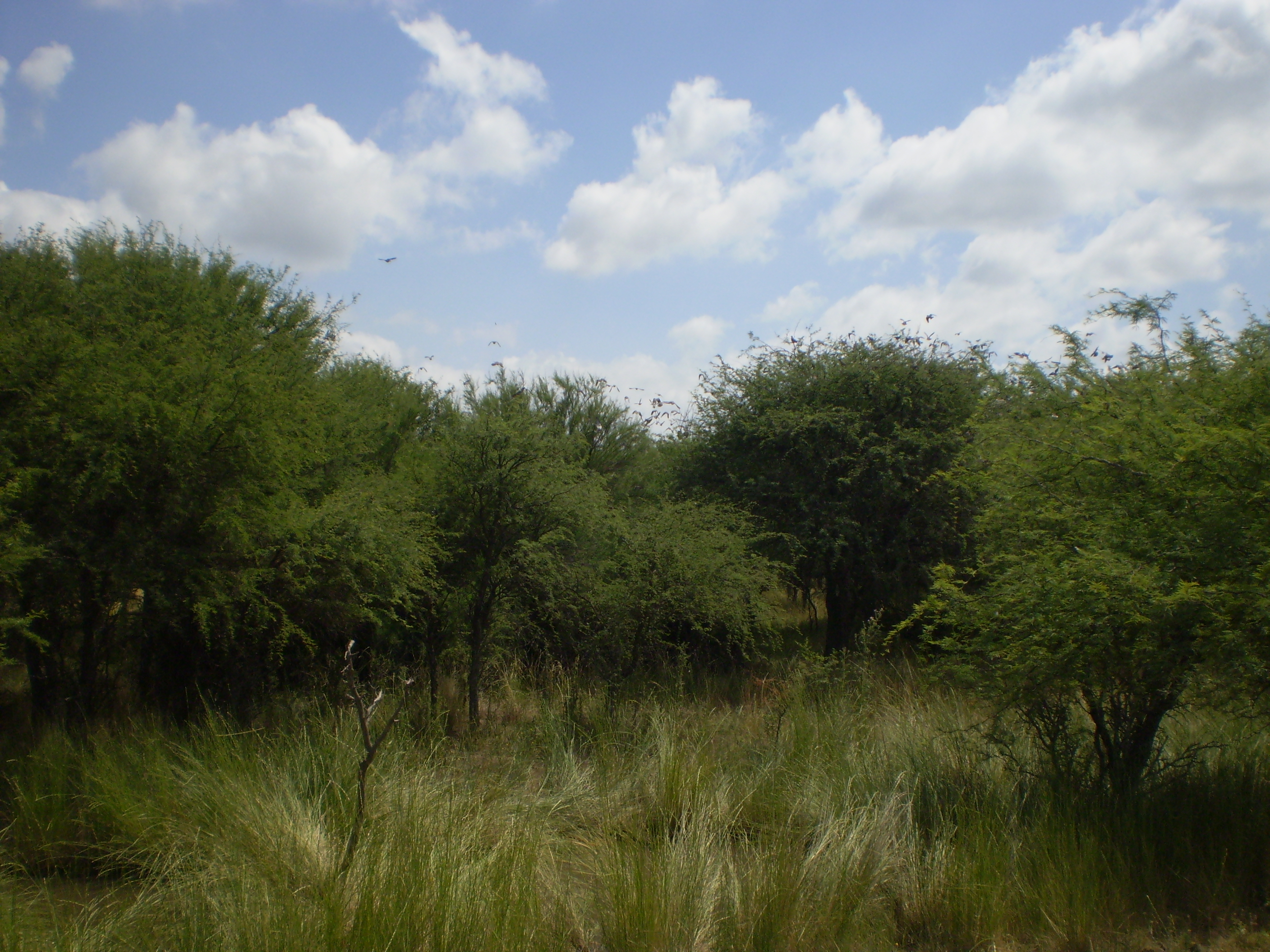 (Monte de caldén) Reserva natural "Parque Luro", La Pampa, Argentina